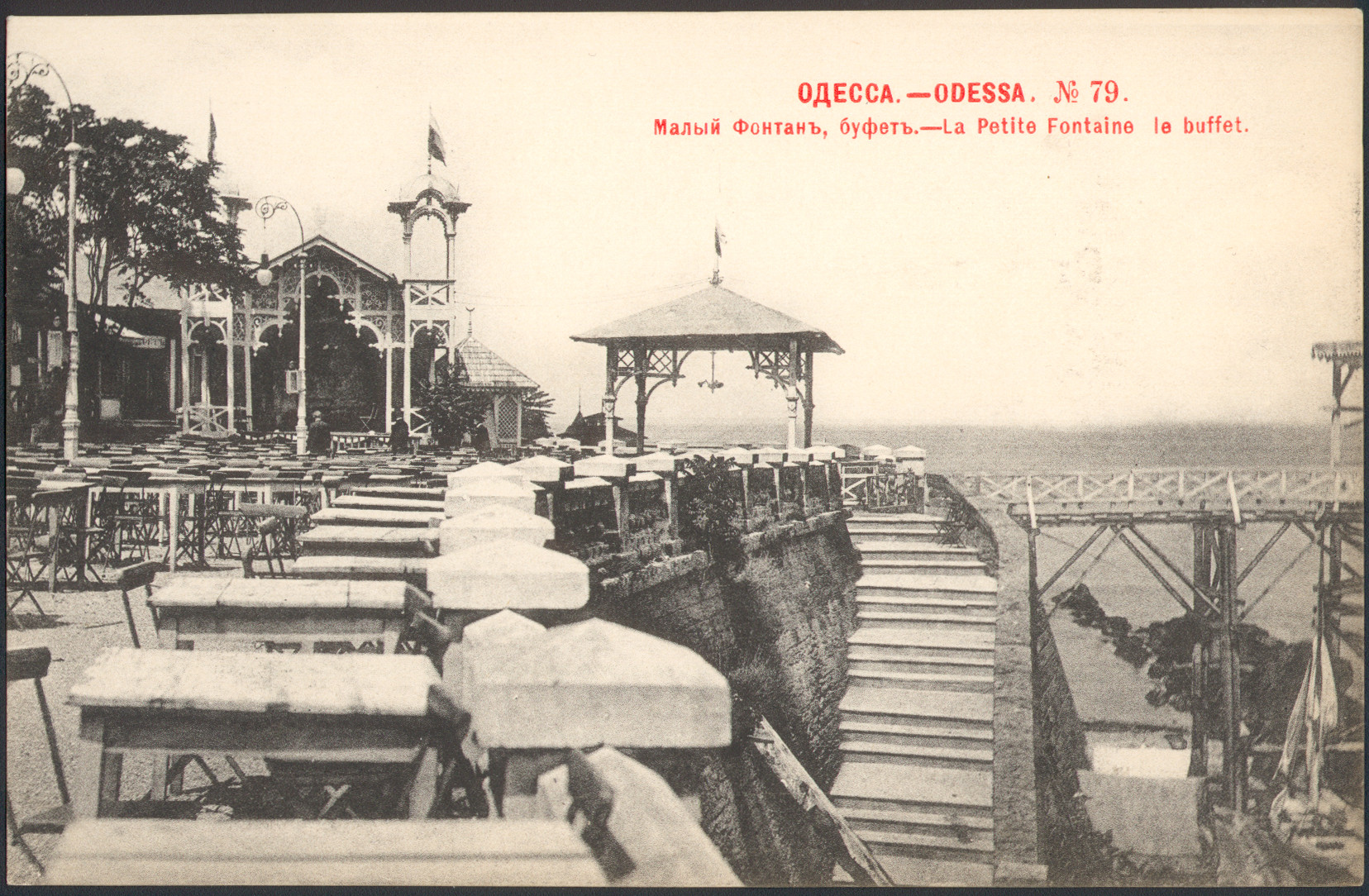 Одесса. Малый Фонтан. Буфет. Почтовая открытка №79.